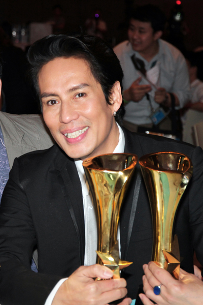 พี่เบิร์ดรับรางวัลนักร้องยอดเยี่ยม และ นักร้องขวัญใจมหาชน